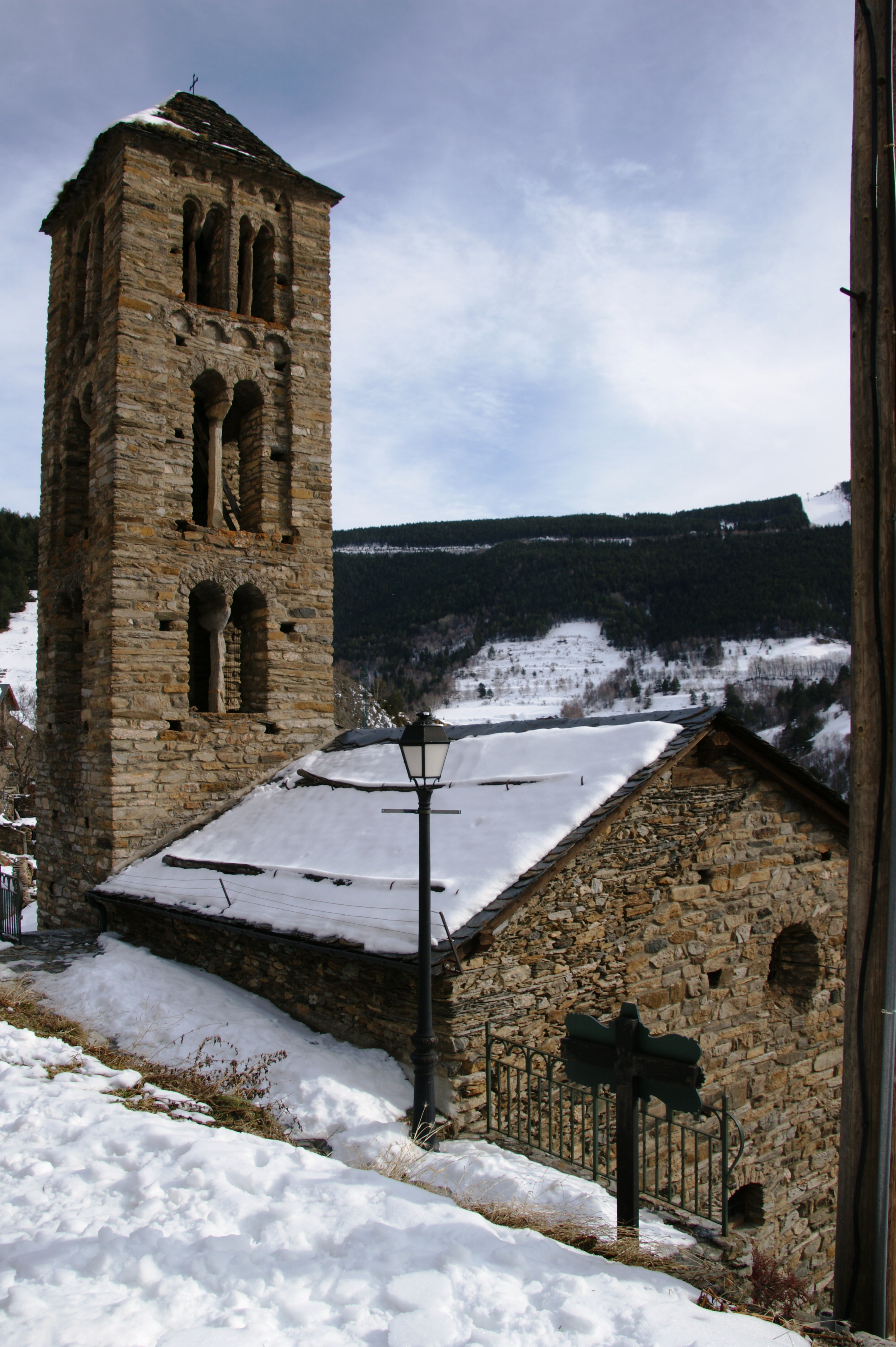 Església de Sant Climent de Pal